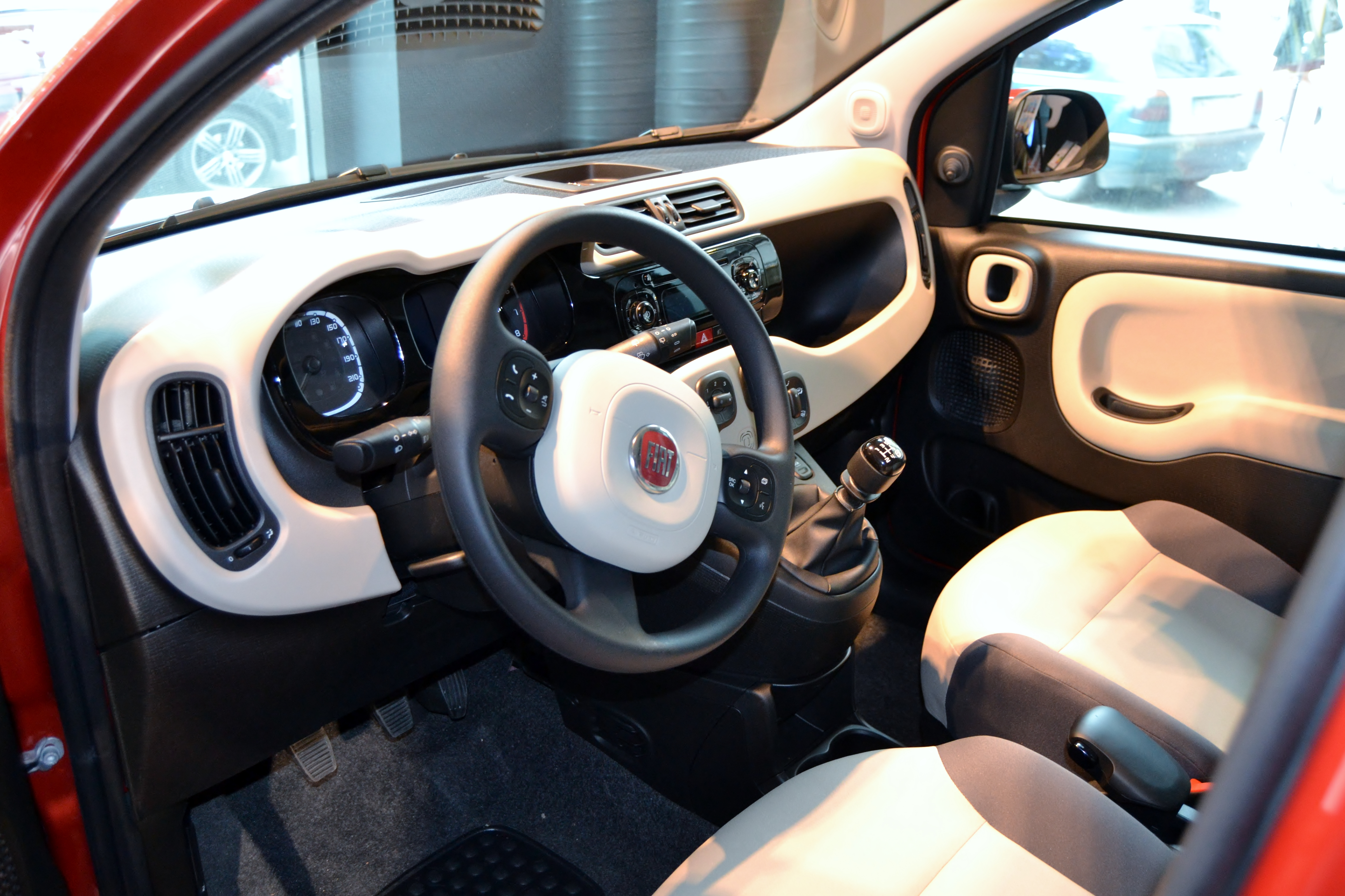 Fiat Panda 2012 - Vista interior